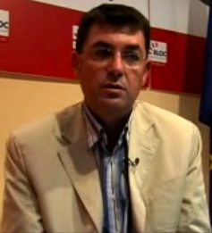 Enric_Morera_-_Secretari_General_del_BLOC_Nacionalista